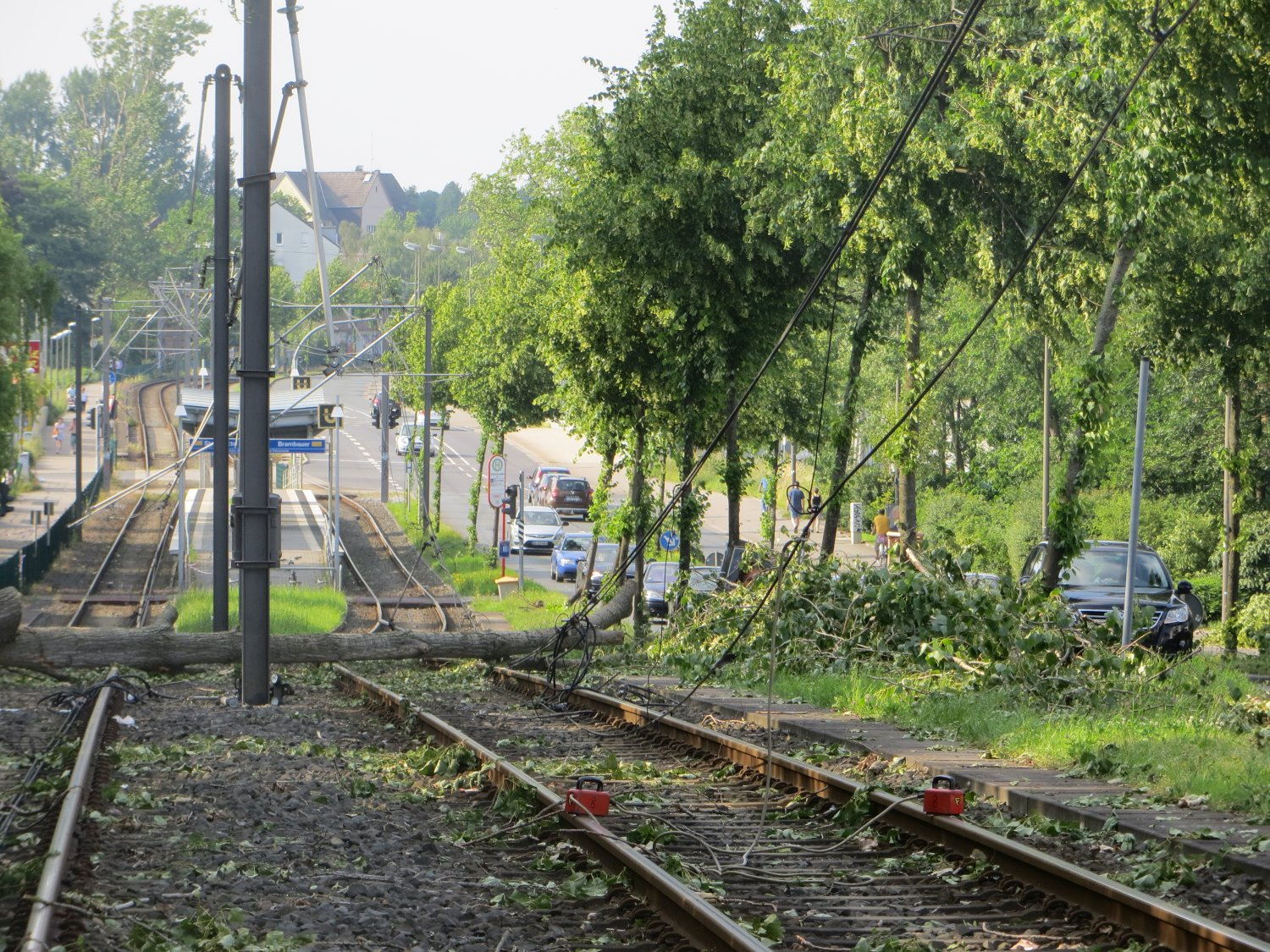 Nach Gewitter und Sturm in der Nacht ist die U41 in Dortmund-Brechten zwischen Maienweg und Wittichstraße noch immer durch einen Baum auf den Schienen und die heruntergerissene Oberleitung blockiert.